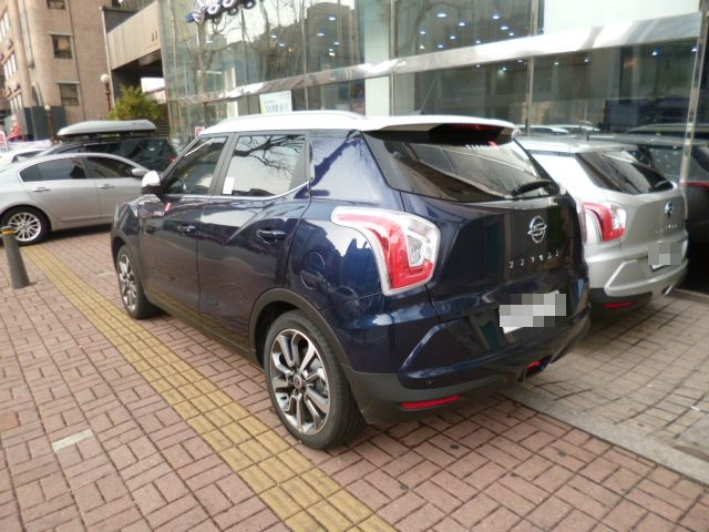 サンヨン・チボリ